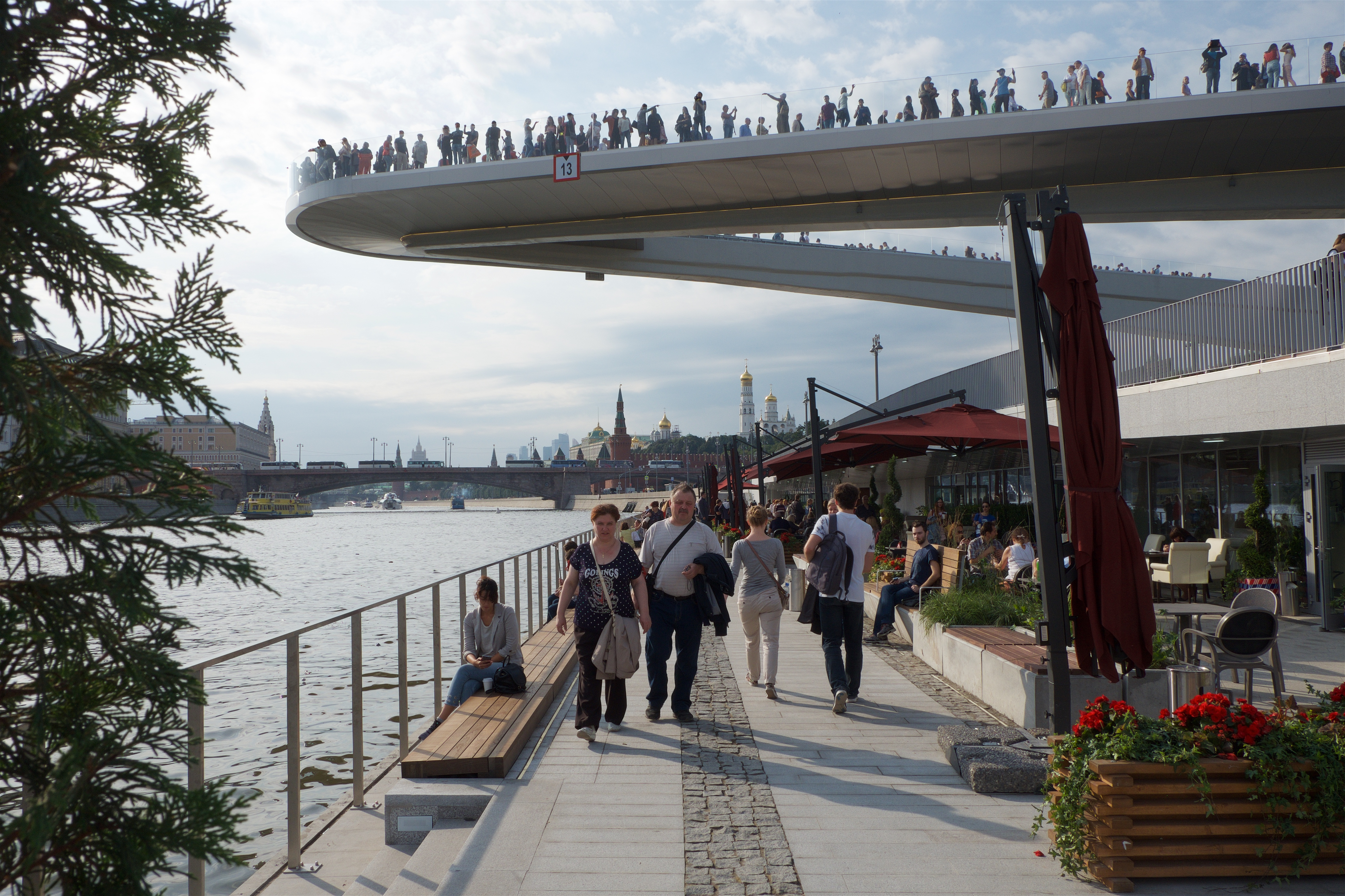 Zaryadye Природно-ландшафтный парк «Зарядье», Zaryadye Park, Parc Zariadié